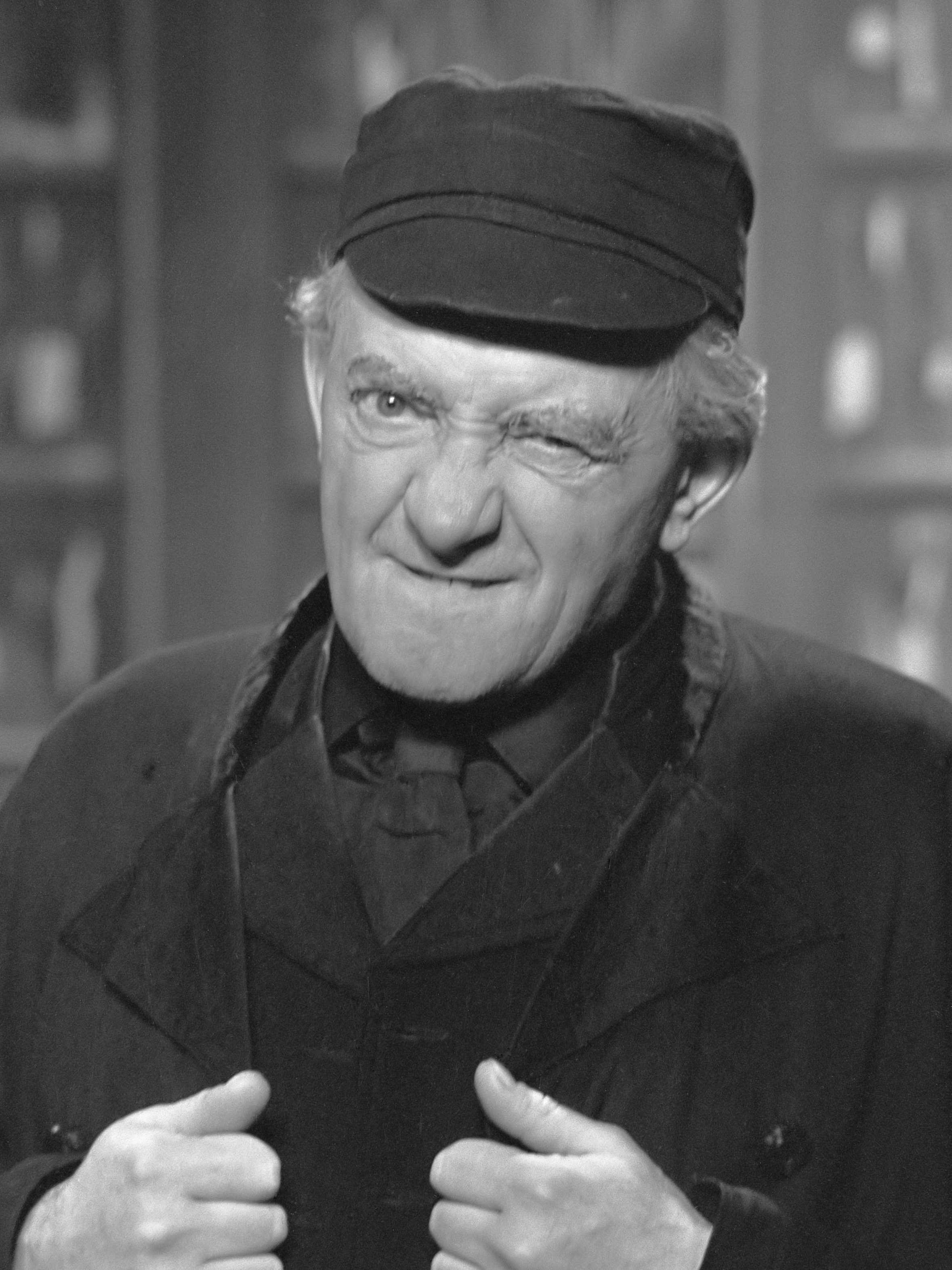 Opnames van het TV-programma "Panorama Woensdagshow" 1 maart 1974